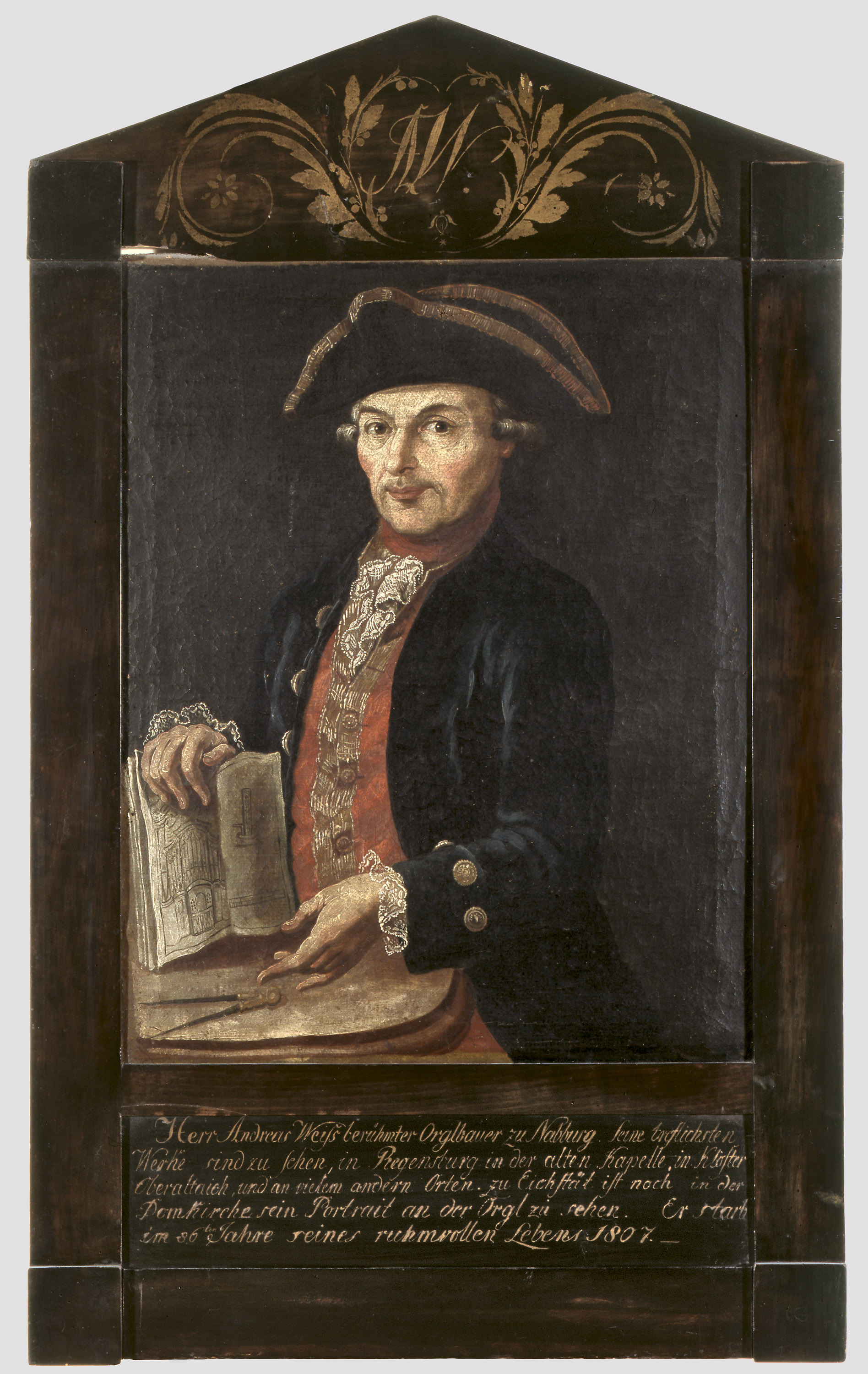 Gemälde (anon.) des Orgelbauers Andreas Weiß, Nabburg (Privatbesitz). Fotographie von Studio Anton Brandl, München, mit freundlicher Genehmigung.